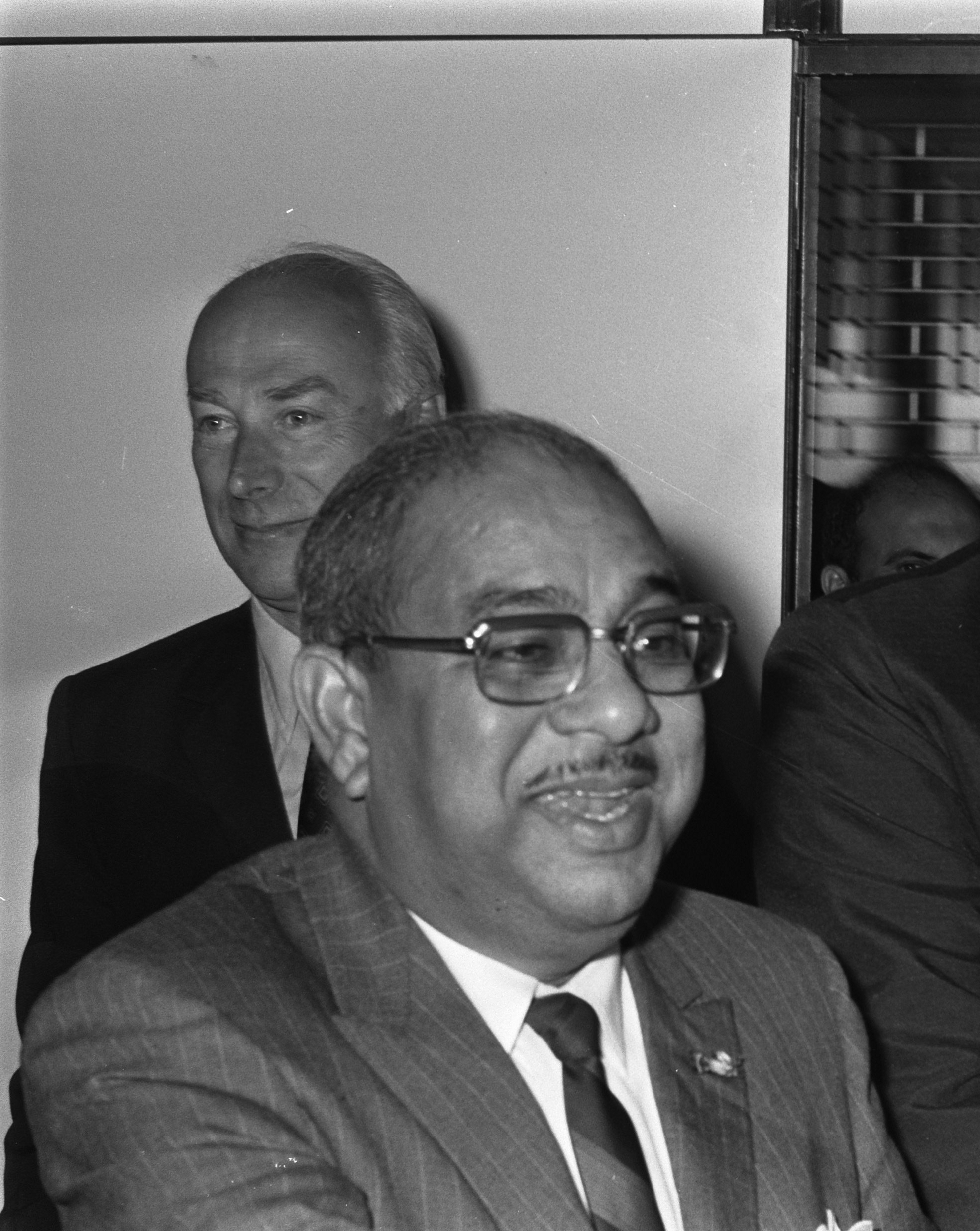 Minister Radhakishun van financien van Suriname.